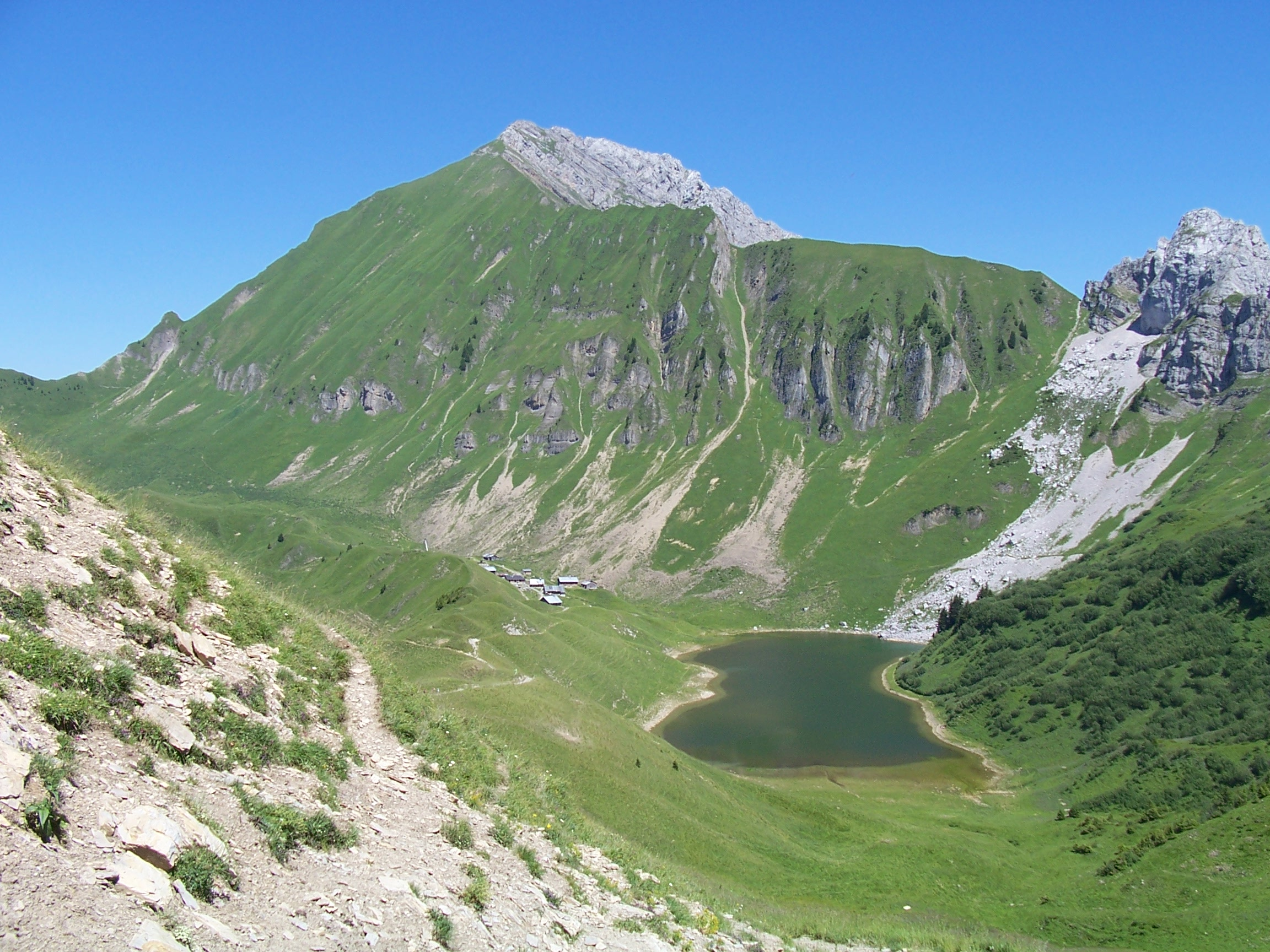 Lac de lessy vom Col de la Forclaz. Col de Sosay links, Pic de Jallouvre (2408m), Le Buclon (2072m) rechts